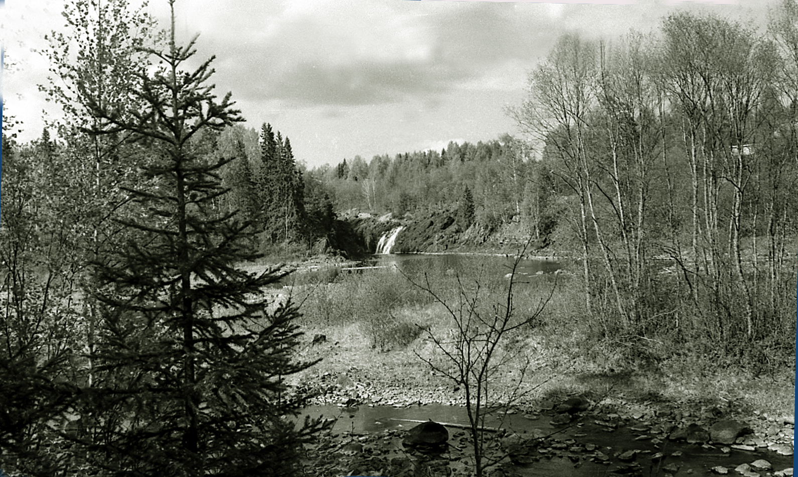 Карелия.Водопад Кивач